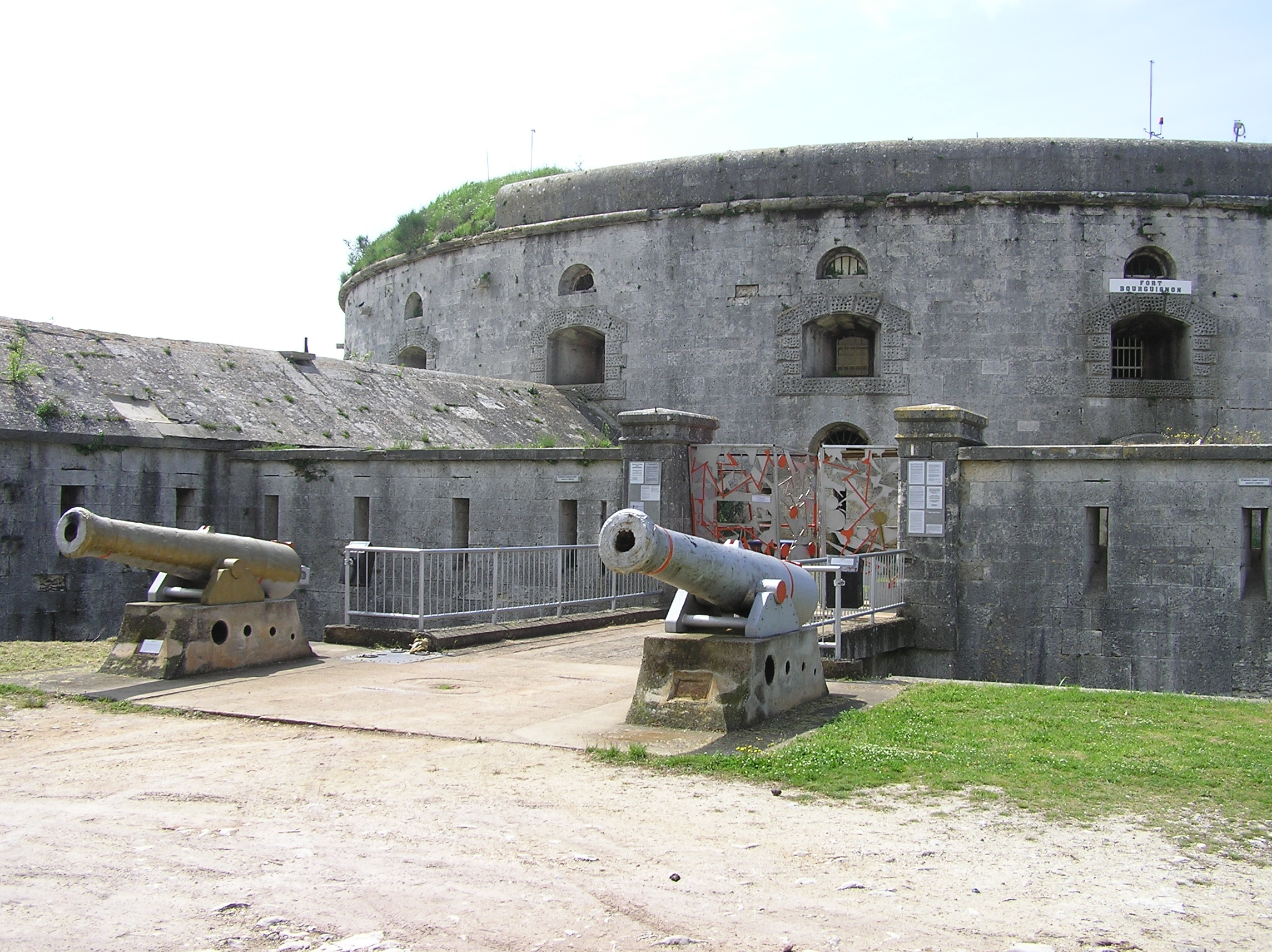 self-made